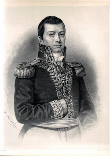 Portrait de Julien- Marie Cosmao Kerjulien, lithographie